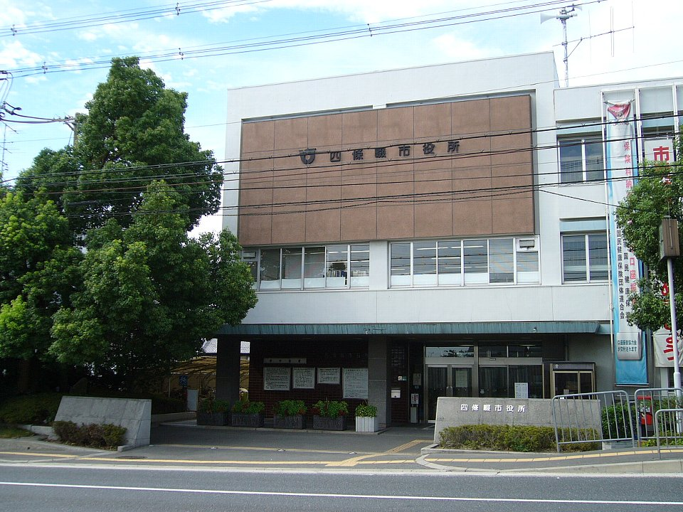 四條畷市役所 2006年8月 Bakkai撮影